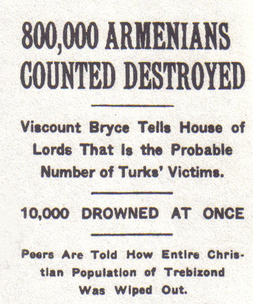 Une du New York Times concernant le massacre des chrétiens - arméniens et pontiques